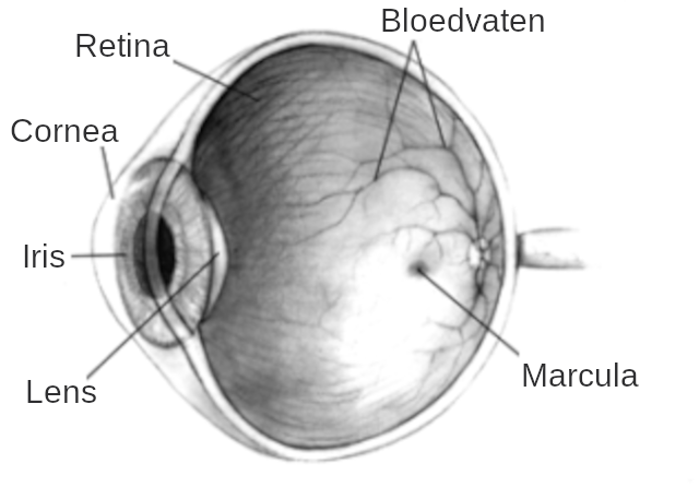 Oogbol.